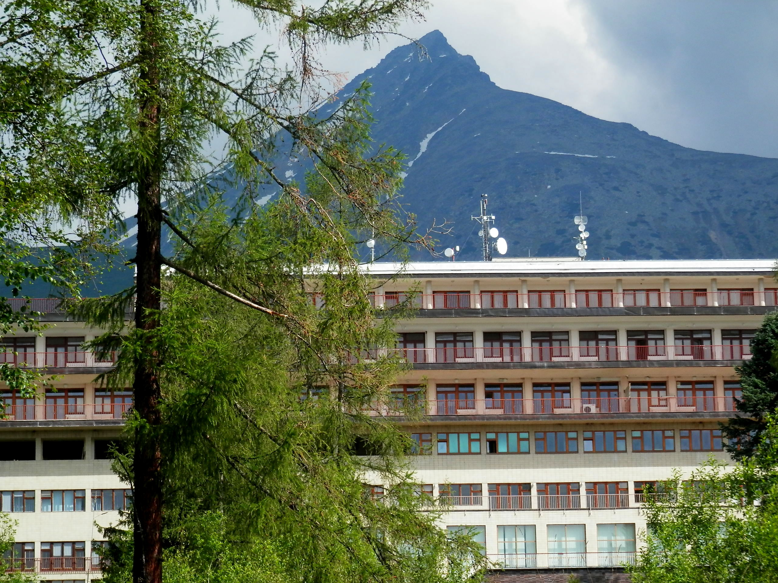 Areál sanatória Vyšné Hágy. Mesto Vysoké Tatry.Budovy v ktorej sídli Národný ústav tuberkulózy, pľúcnych chorôb a hrudníkovej chirurgie. V pozadí tatranský štít Končistá.